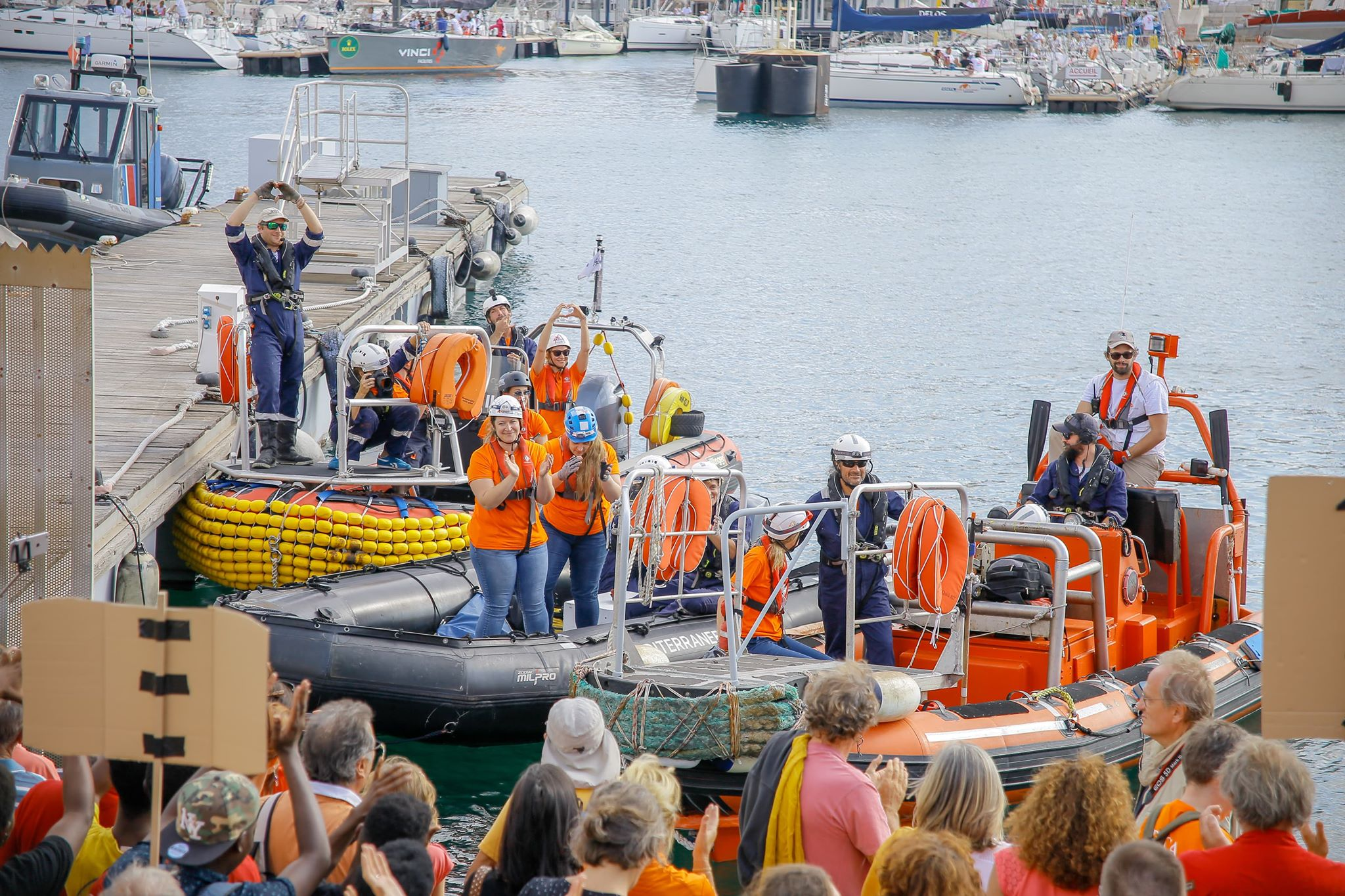 Une partie de l'équipage de l'Aquarius, à Marseille, France, le 6 10 2018